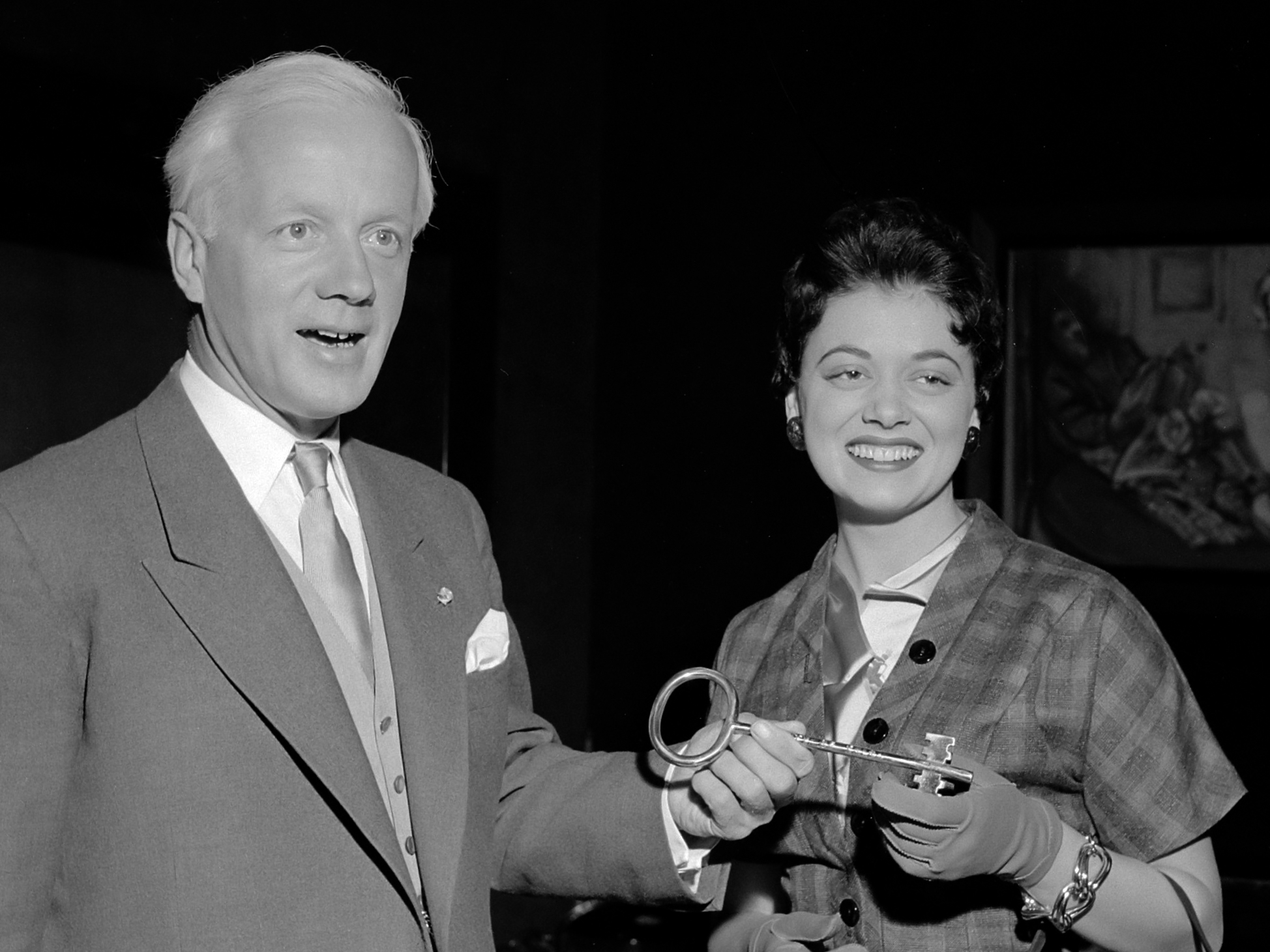 Burgemeester d'Ailly ontvangt Amerikaanse tulpenkoningin 19 september 1955